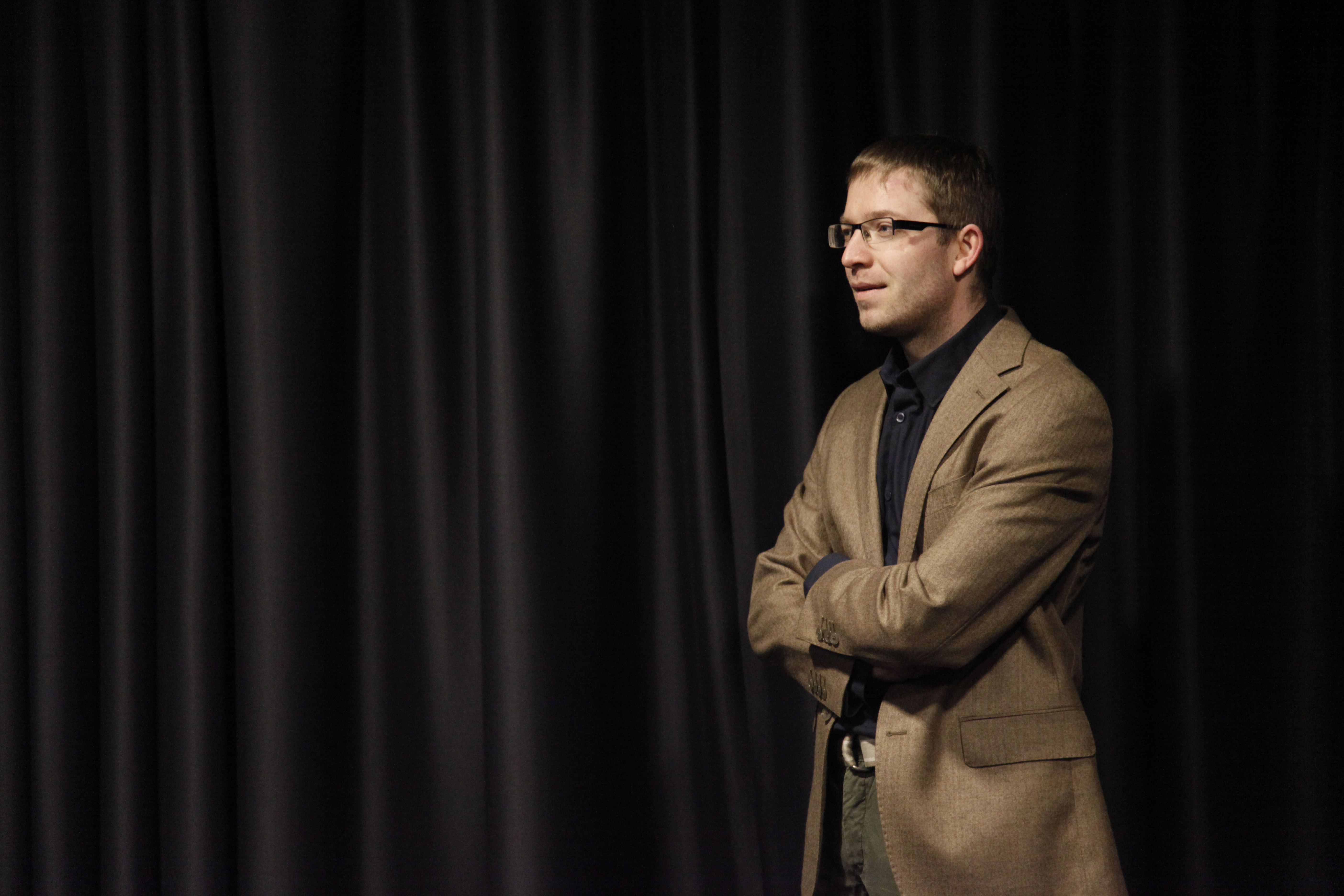 Arko Olesk ESTCube-1 esitlusel Tallinna teletornis.